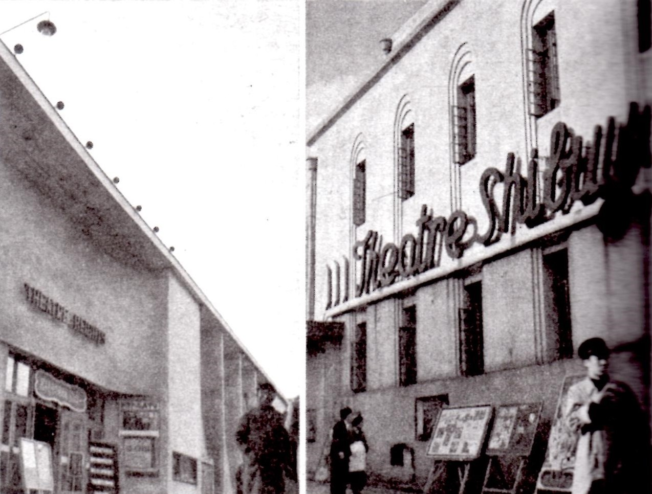 東京都渋谷区の映画館「テアトルハイツ」「テアトル渋谷」。